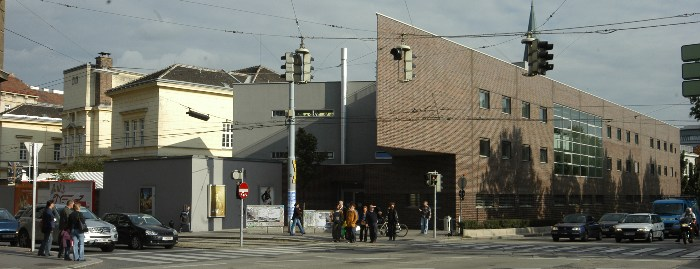 Das Sozialmedizinische Zentrum Sophienspital der Stadt Wien in Wien-Neubau - neu errichteter Trakt